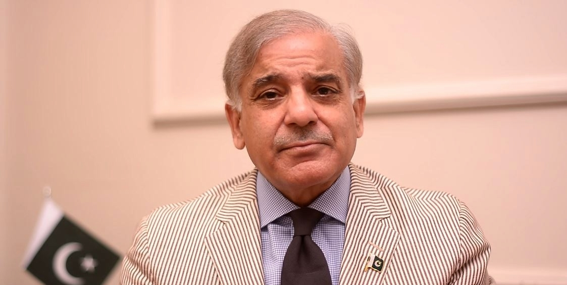 CM Punjab Shehbaz Sharif